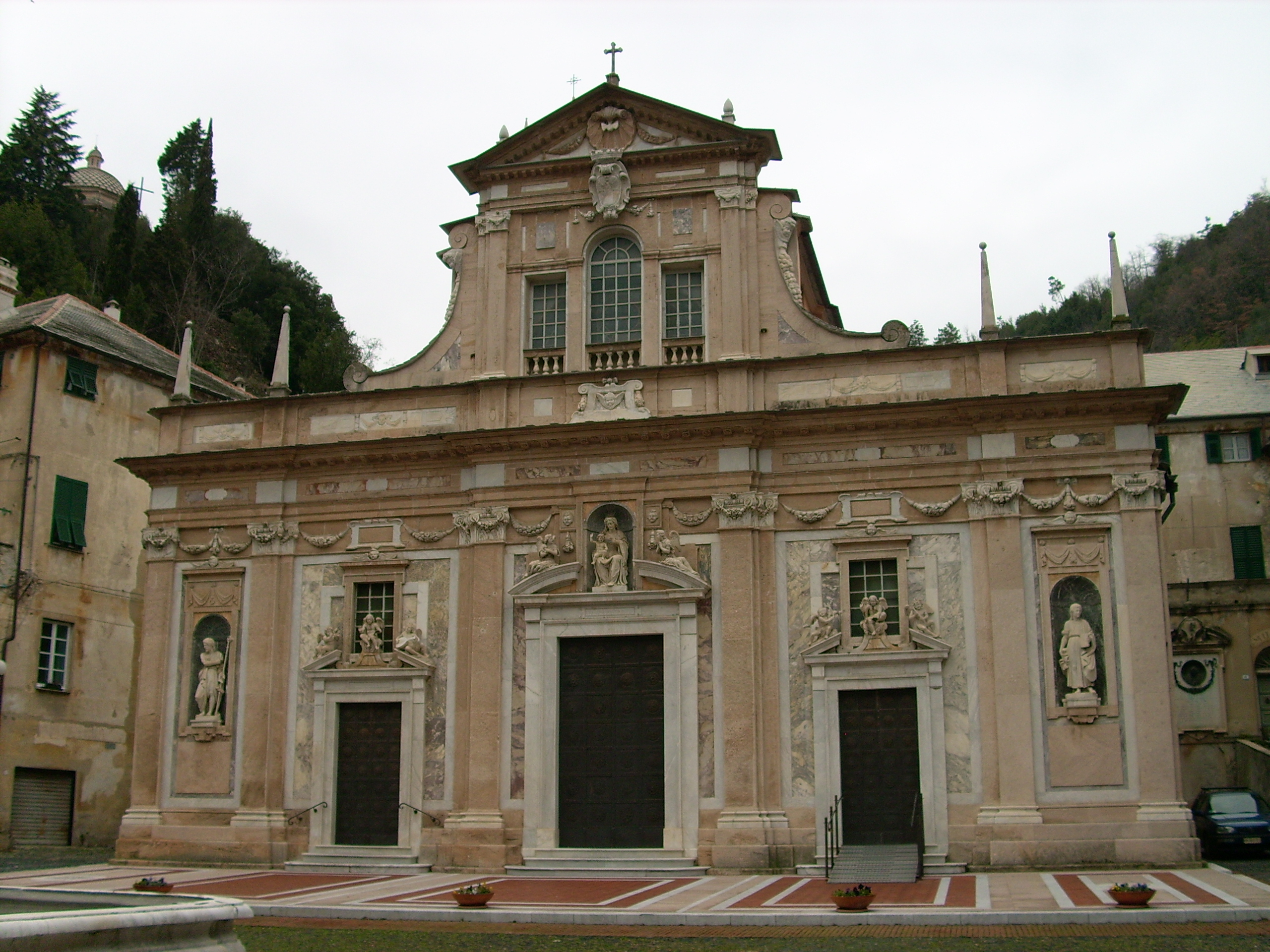 Santuario di Nostra Signora della Misericordia, Savona, Liguria, Italy